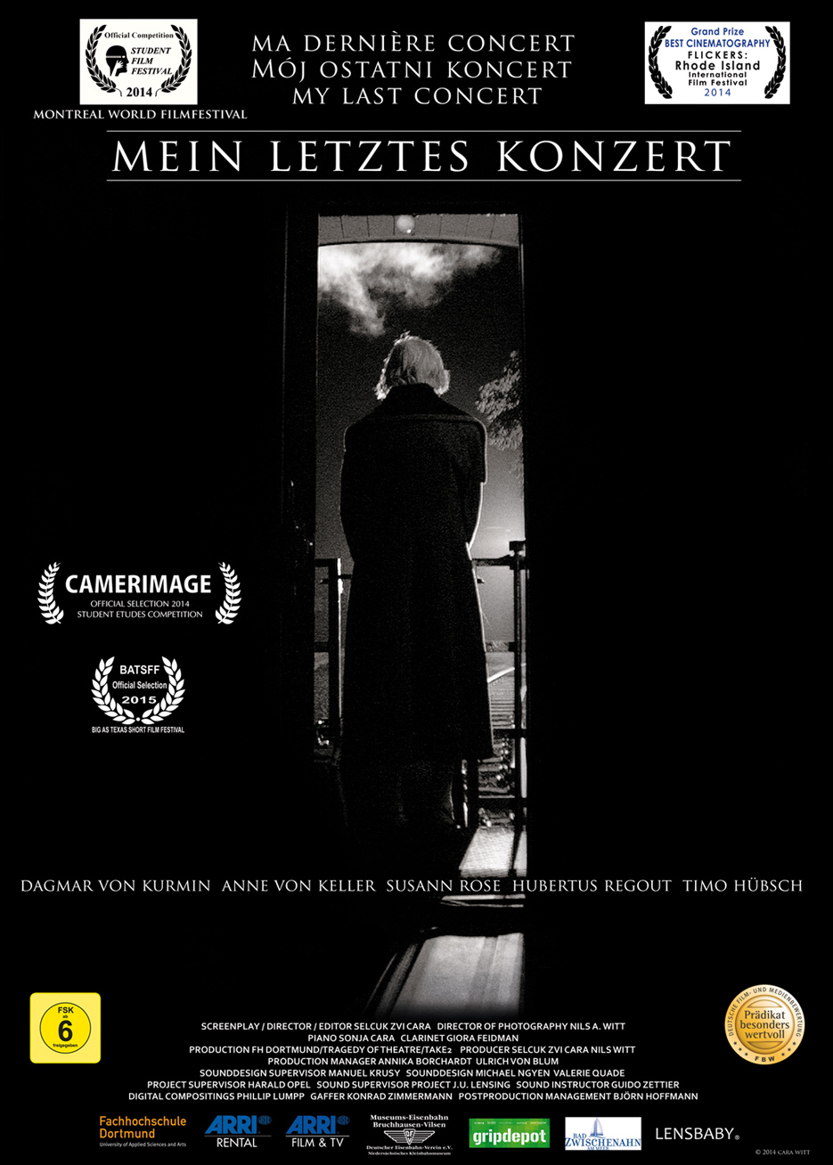 Filmposter "Mein letztes Konzert"